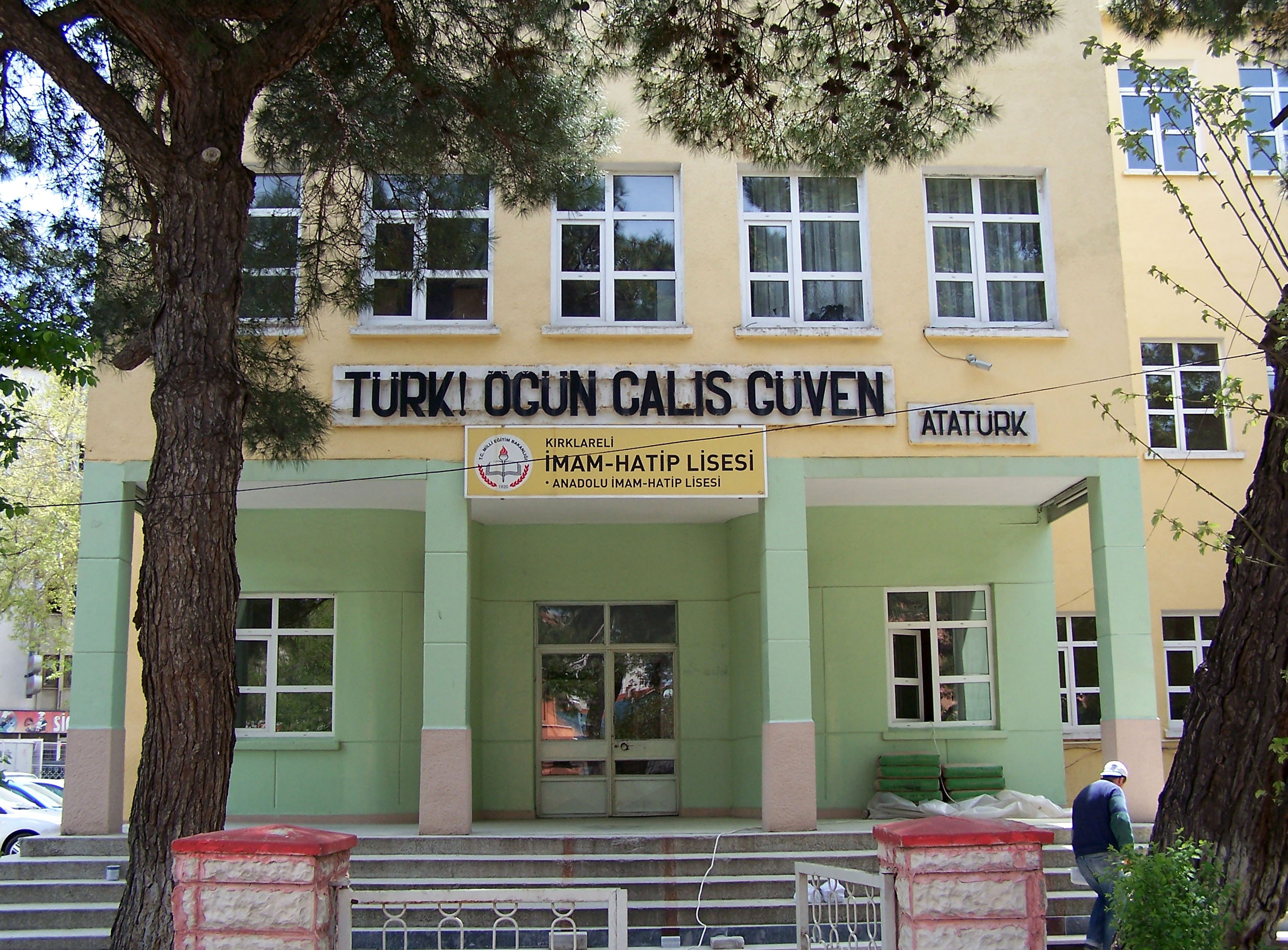 İmam-Hatip Lisesi in Kırklareli, Turkey